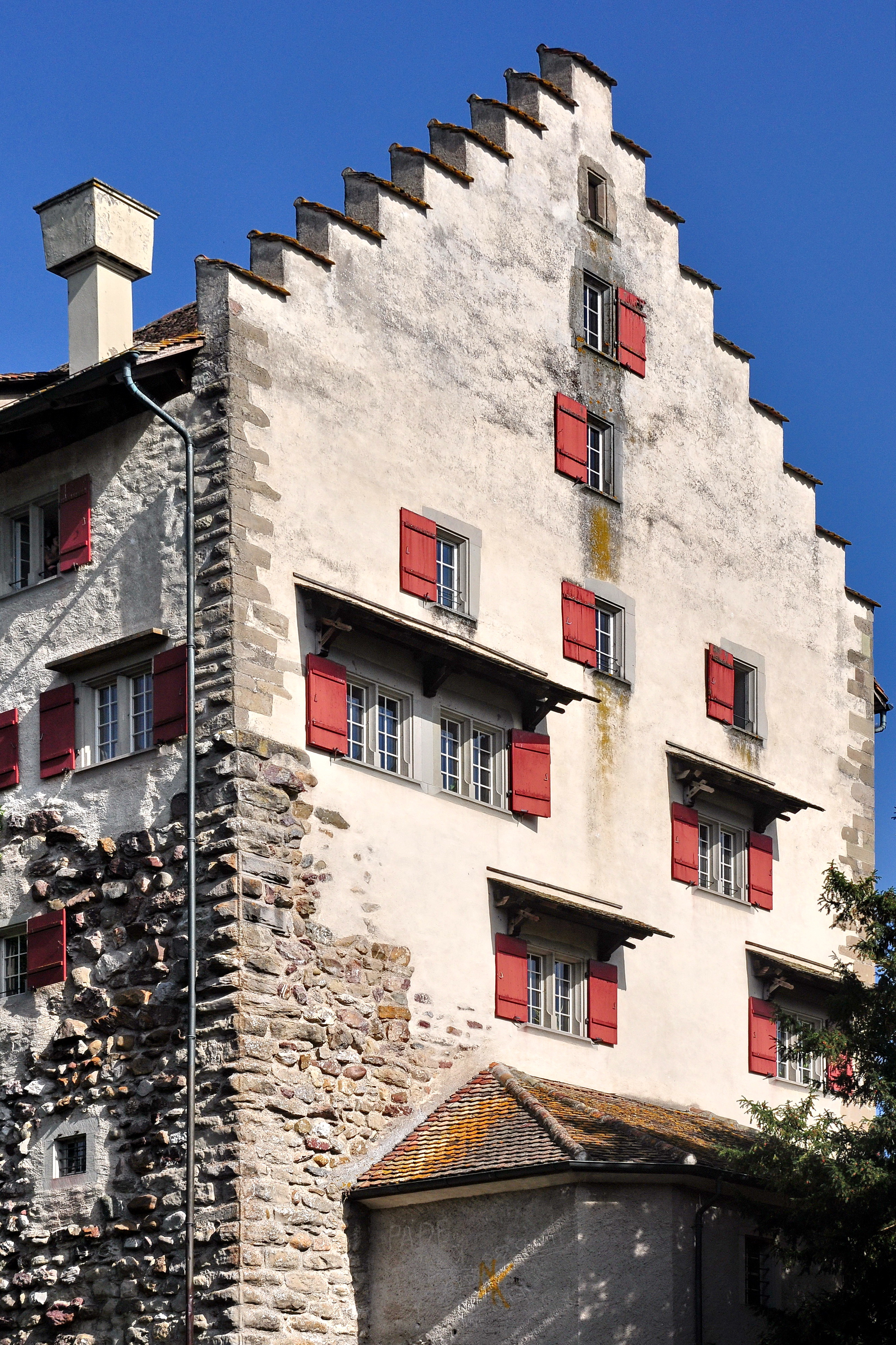 Schloss in Greifensee (Switzerland)